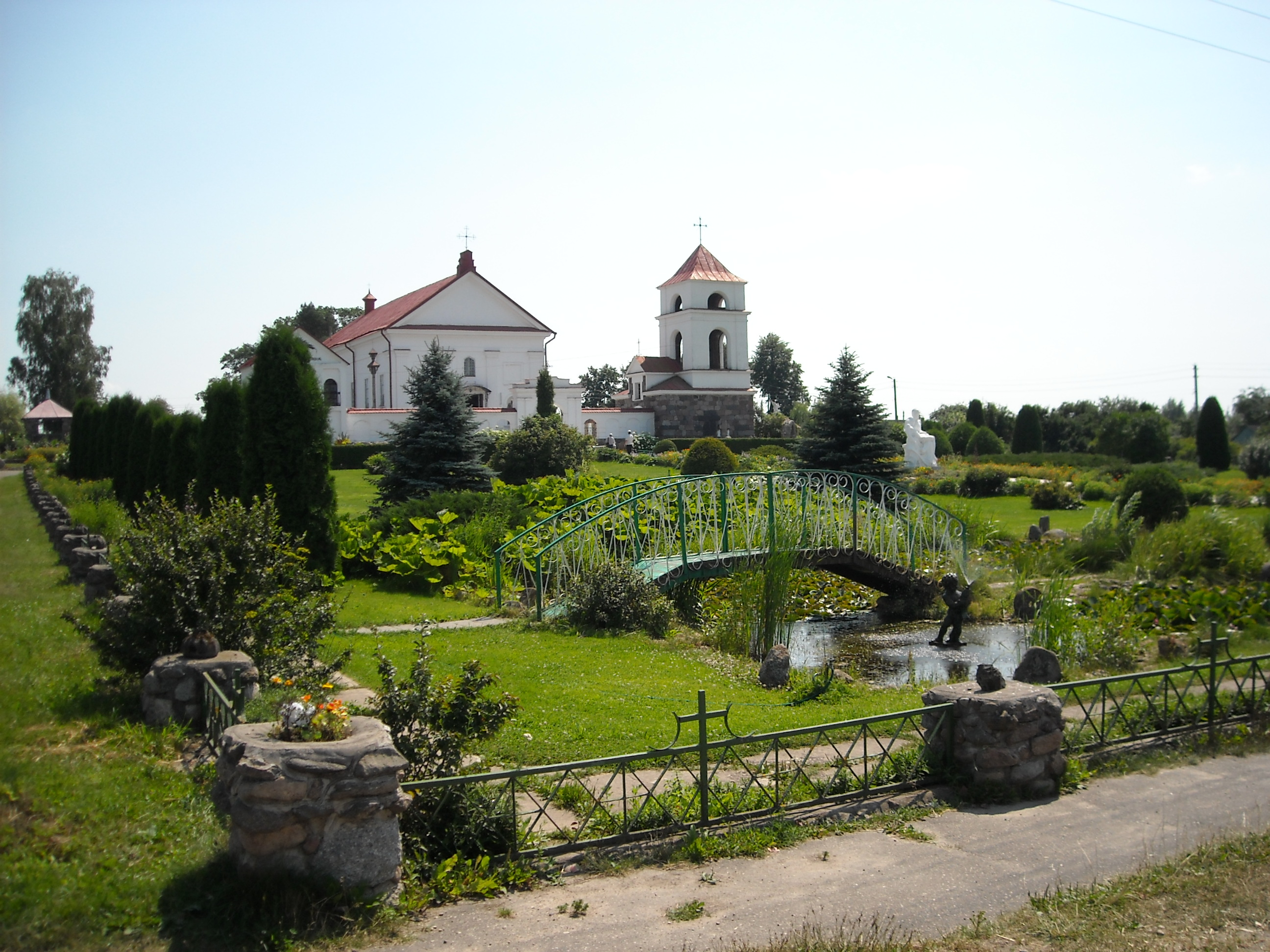 Беларуская (тарашкевіца): Касьцёл сьв. Ганны, 10 сюжэтных барэльефаў у інтэр’еры касьцёла. в. Мосар This is a photo of Belarusian heritage monument. Reference number: 212Г000397 ( WLM)